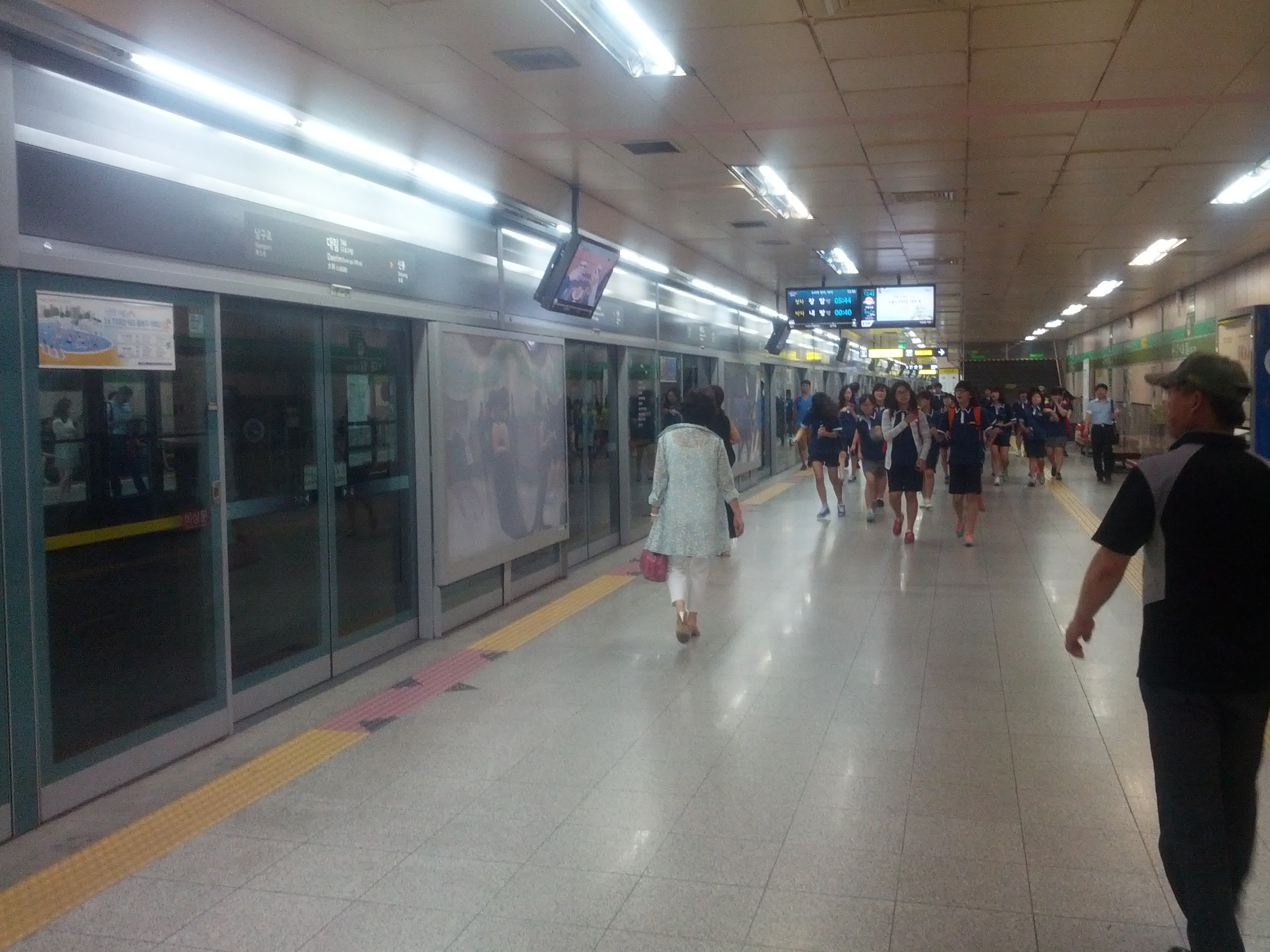 7호선 대림역 승강장